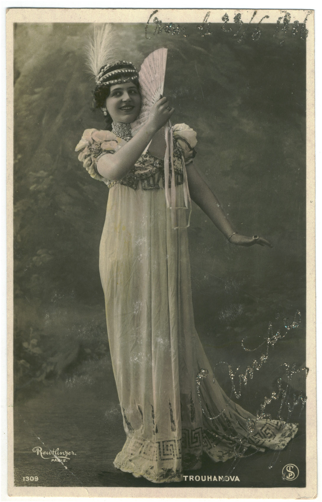 TROUHANOVA_Natacha_SIP. 1309. Photo Reutlinger